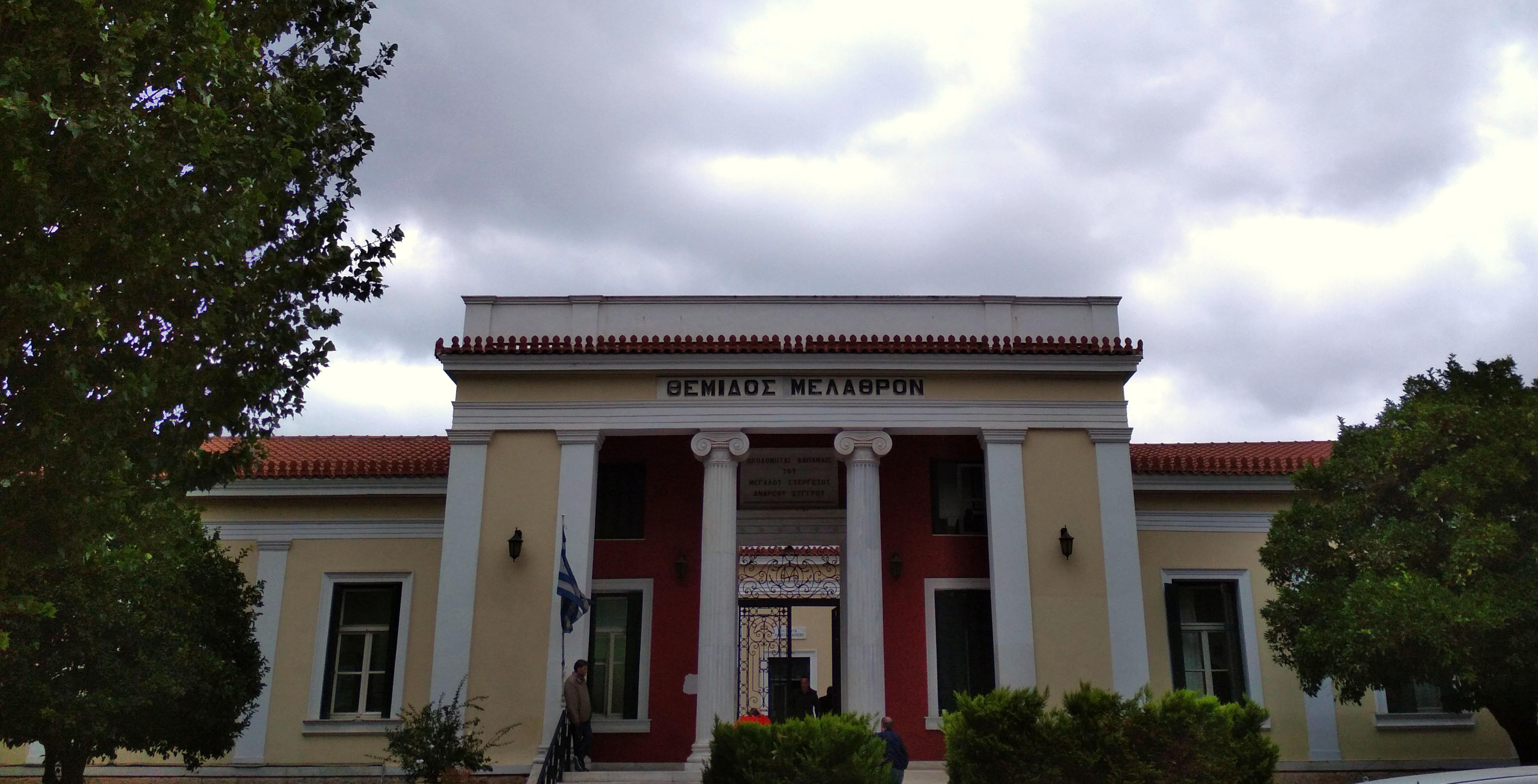 Δικαστικό Μέγαρο Χαλκίδας, όπως φαίνεται από την οδό Βενιζέλου«Δικαστικό Μέγαρο Χαλκίδας»